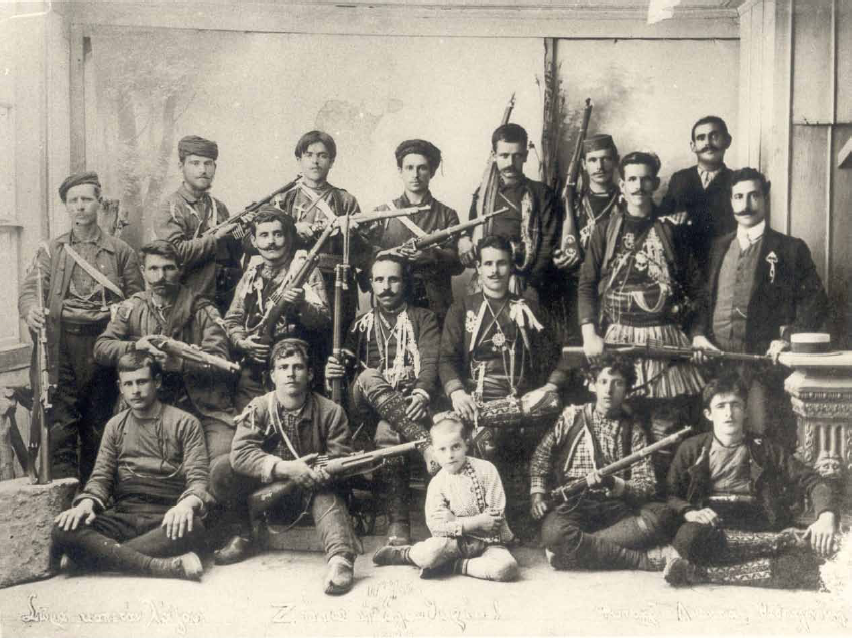 Четата на гъркоманския капитан Лазар Дояма.